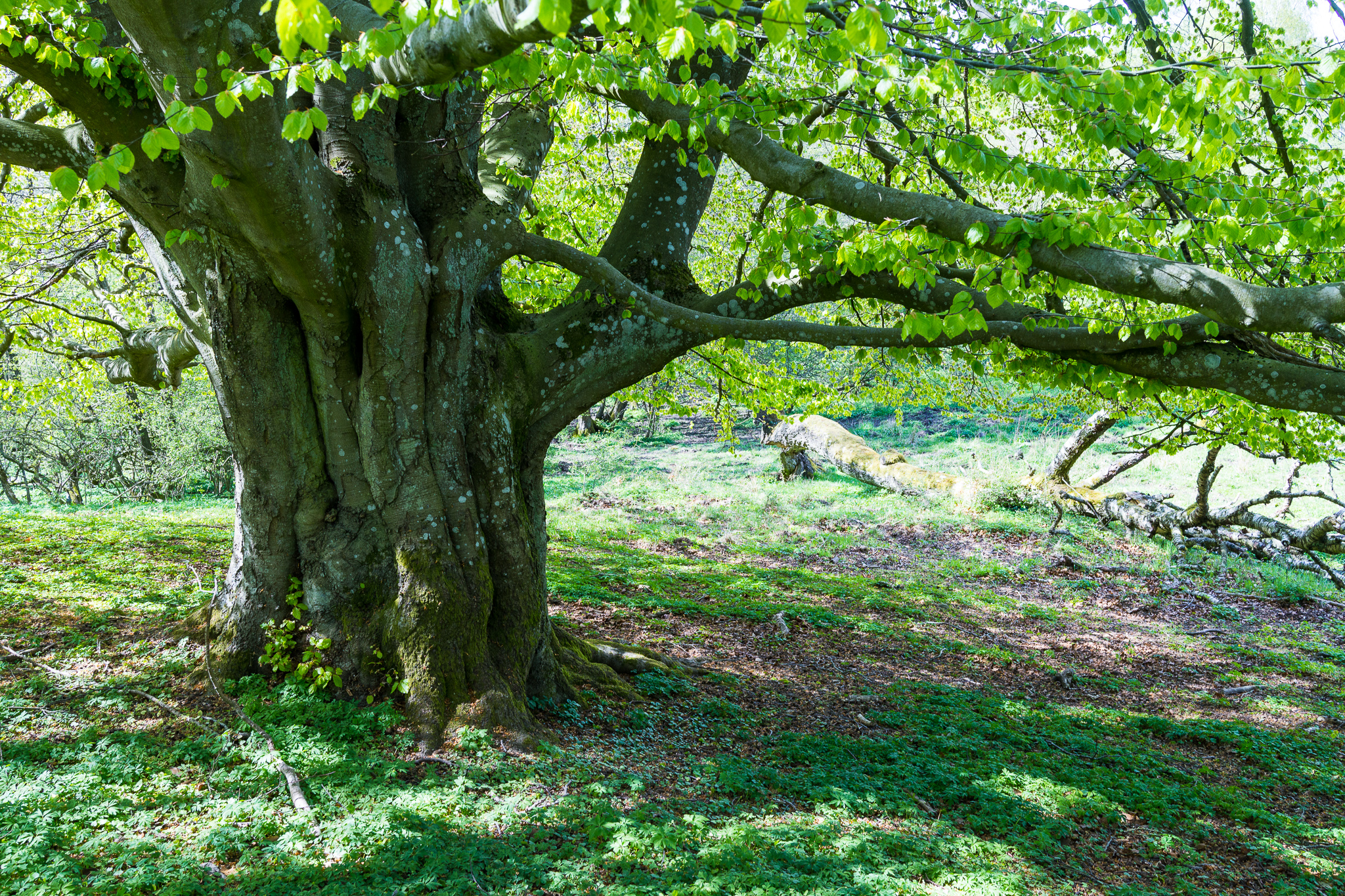 Alte Buche im Skoghejdan naturreservat